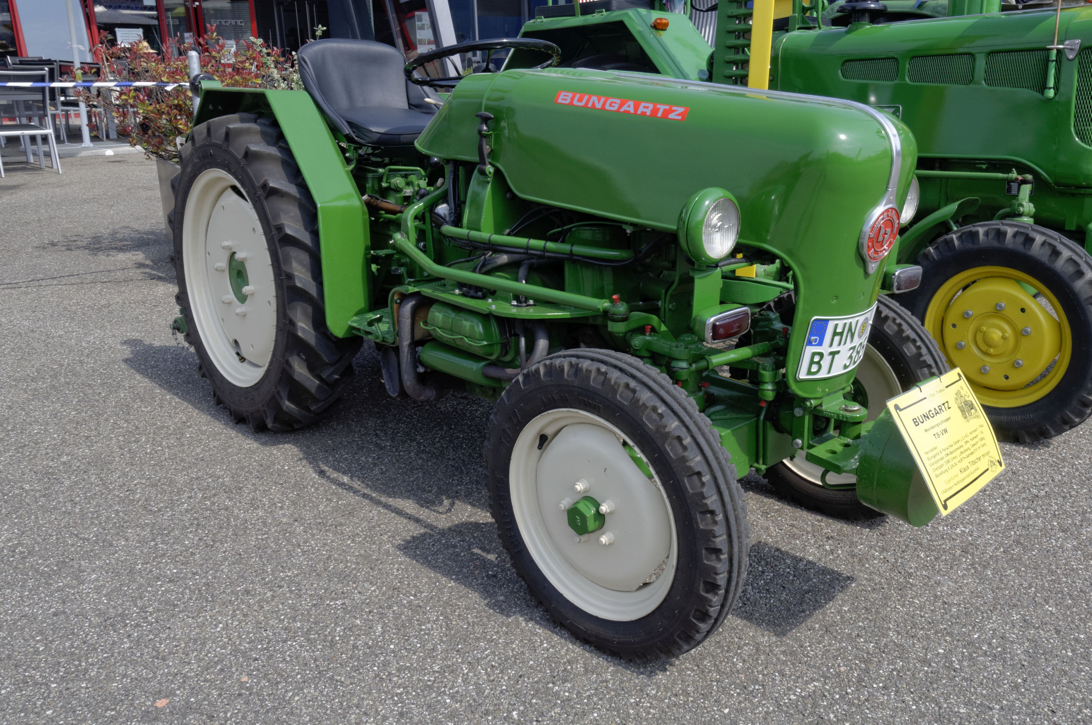 Agri Historica 2019